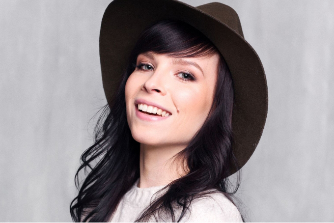 Paulina Mikuła - polska osobowość internetowa. Warszawa, 2016